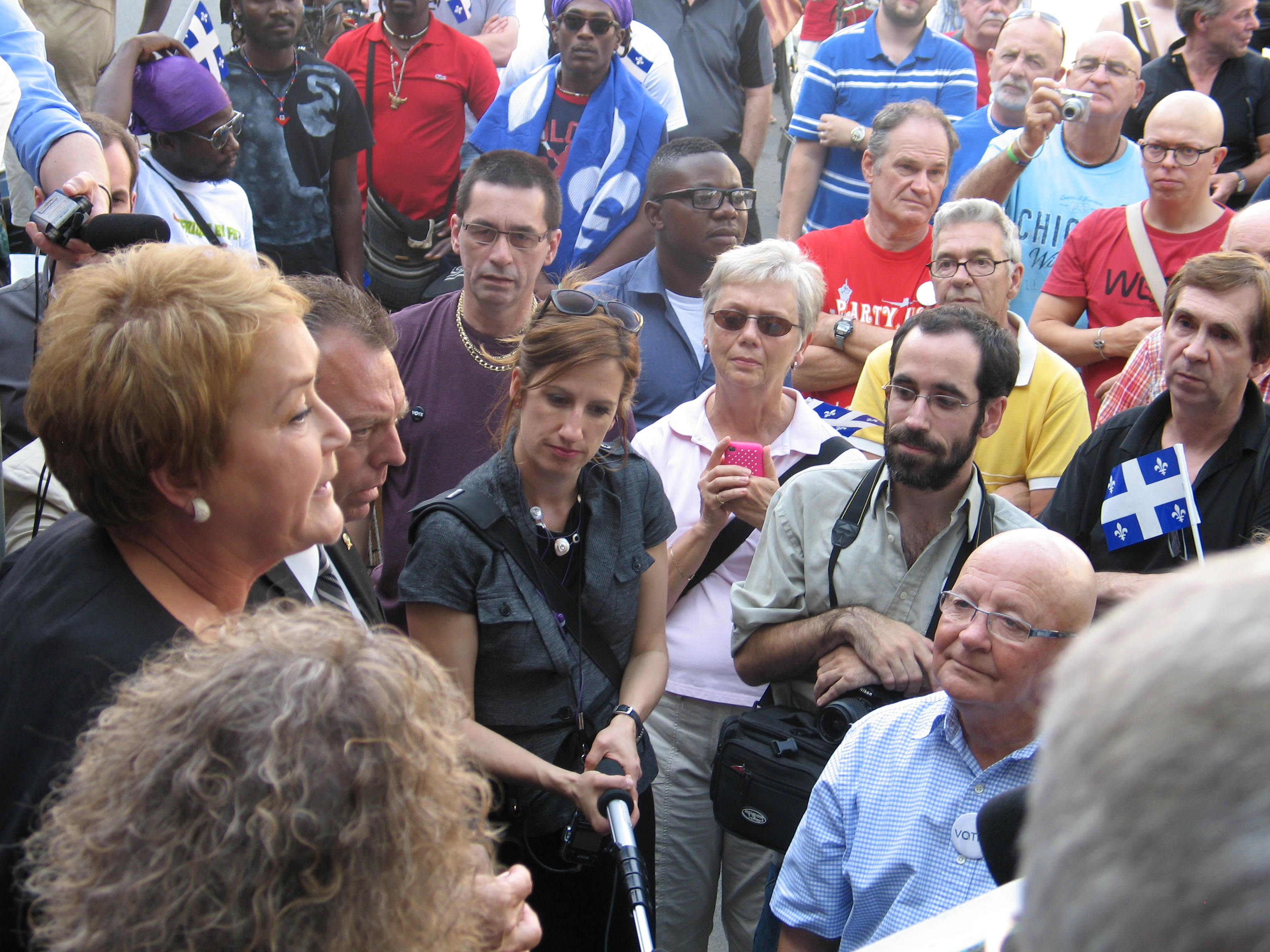 Pauline Marois prononce un discours dans un bar du quartier Limoilou de Québec à la veille de l'élection générale québécoise de 2012.